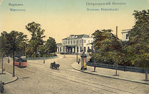 Петроградский вокзал в Варшаве. Дореволюционная открытка.